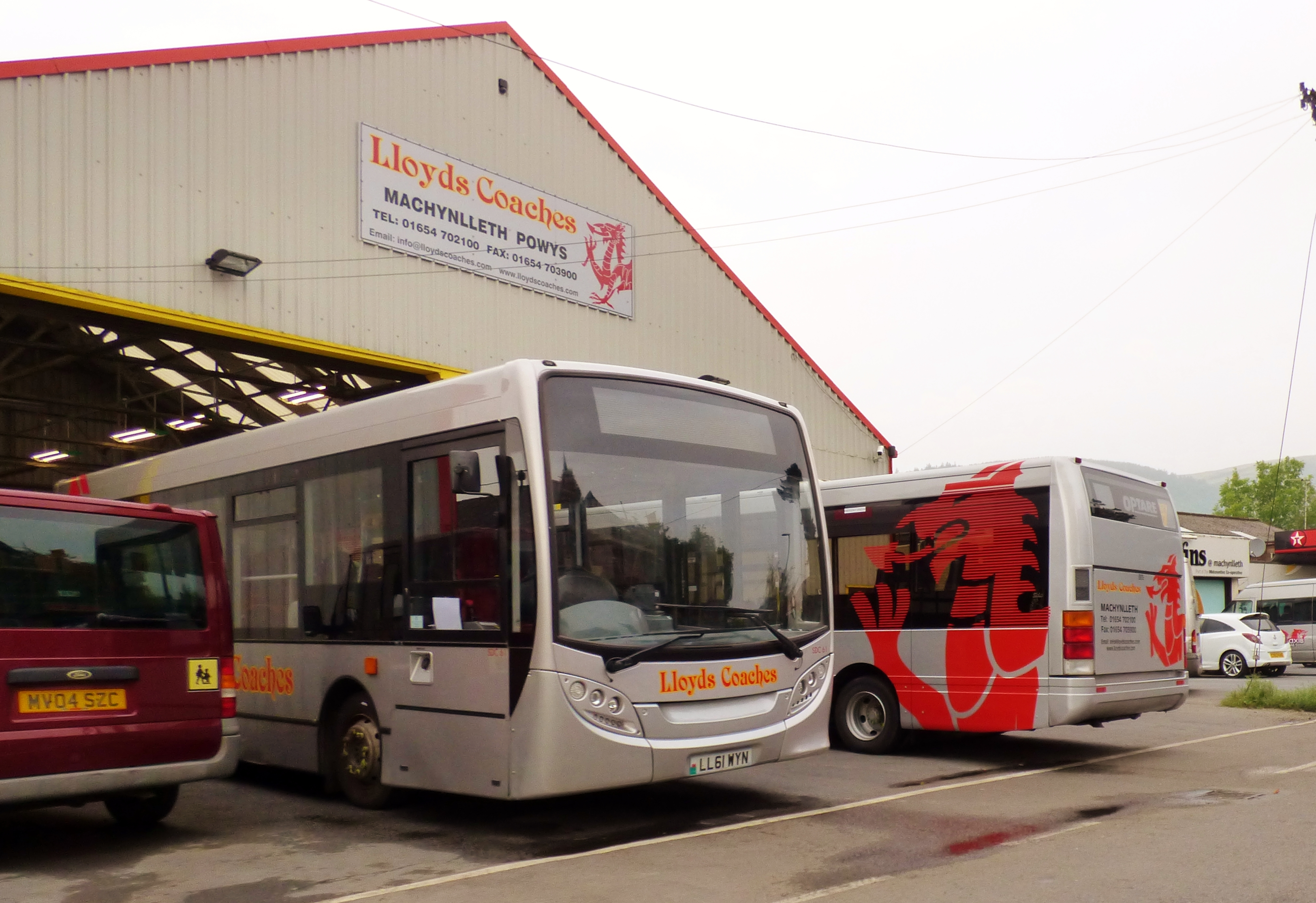 Machynlleth.